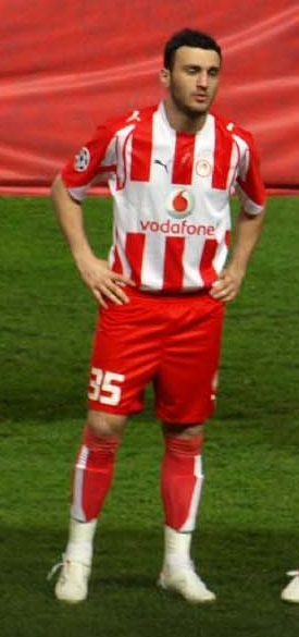 Vasilis Torosidis Chelsea (3) v (0) Olympiakos